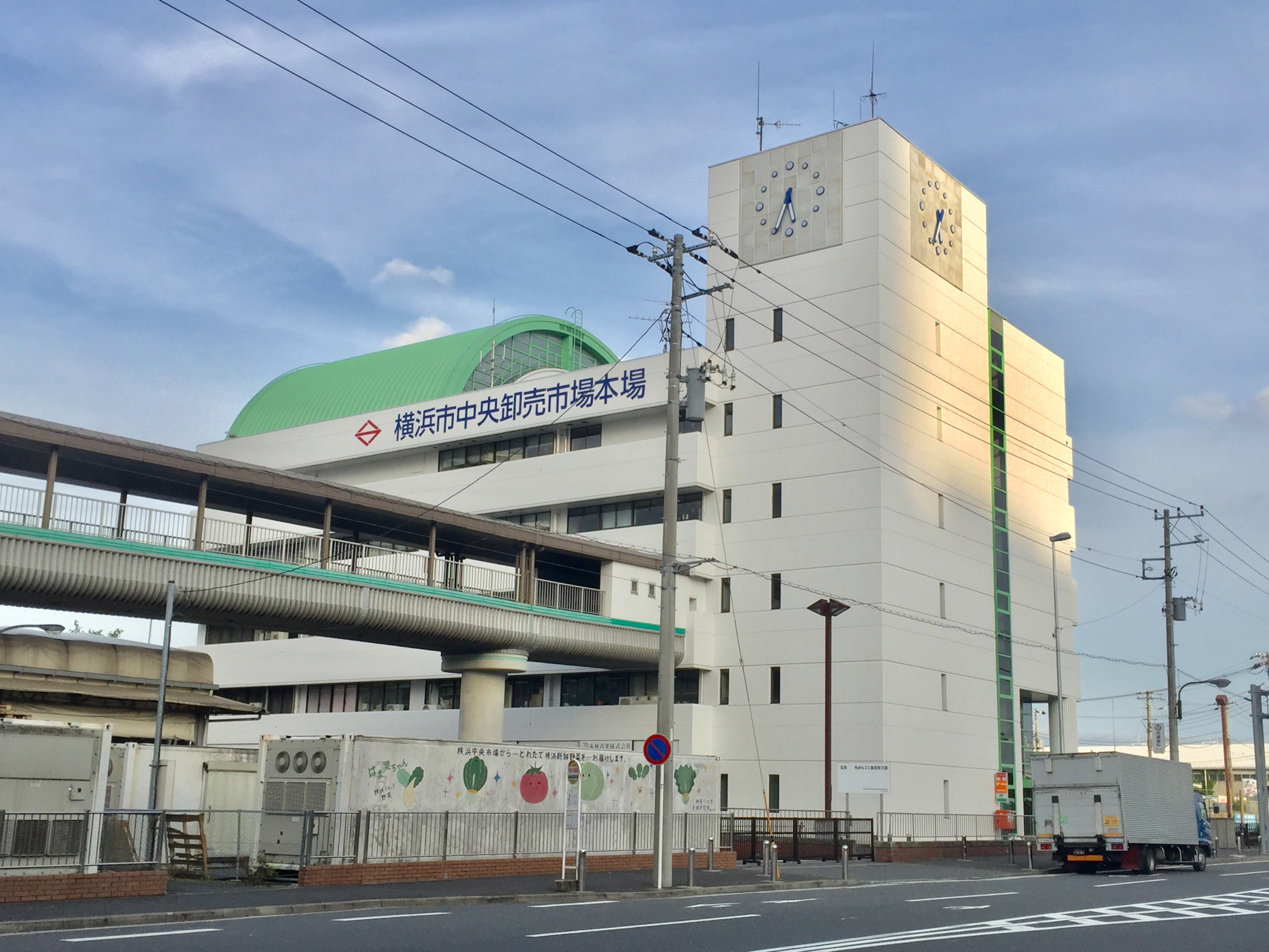 横浜市中央卸売市場本場、市場センタービル（2017年5月撮影）。屋根が茶色から緑に塗り替えられている。